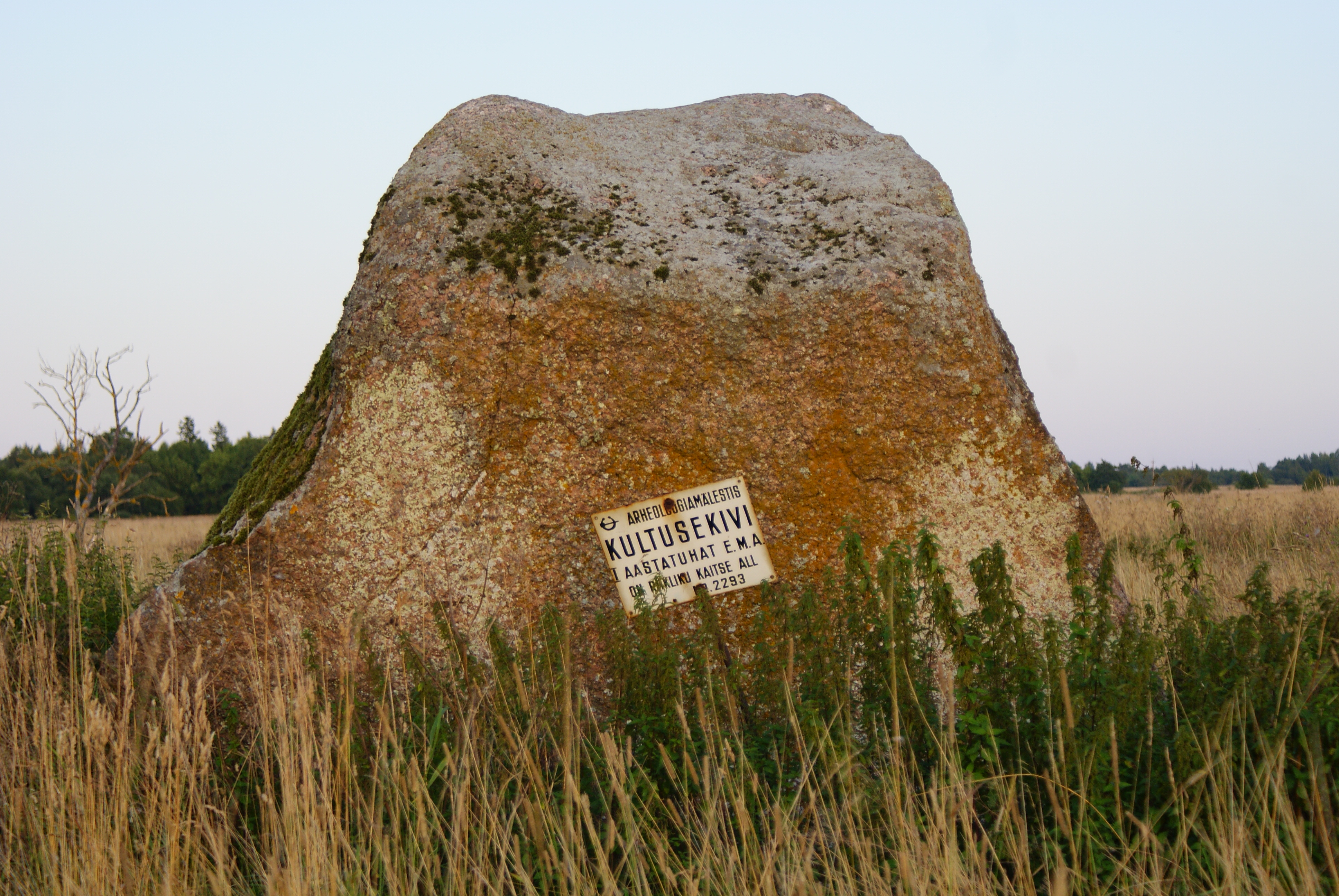 Kultusekivi Liukivi